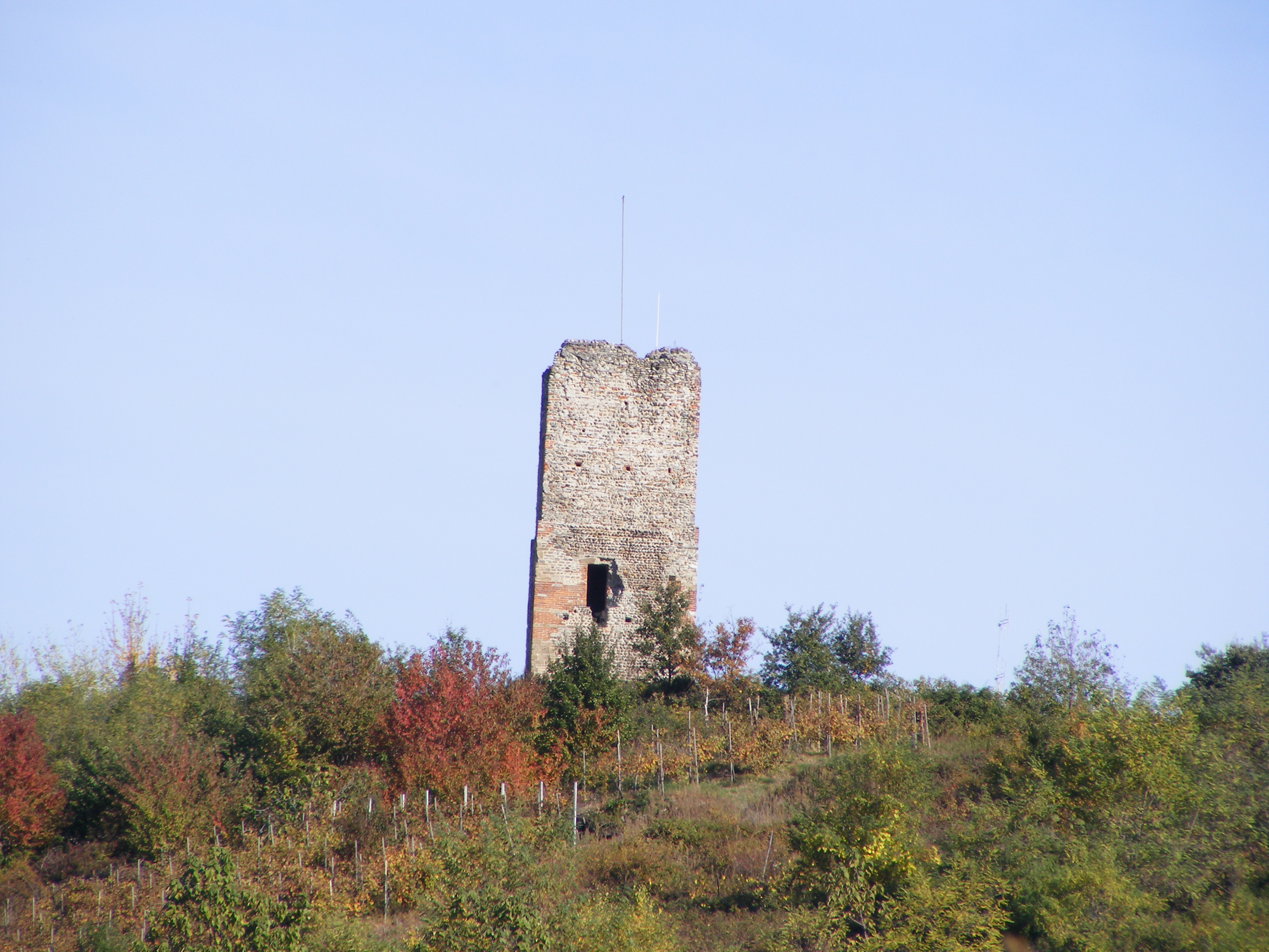 Autore: Giovanni Schiochet Fonte: personale Descrizione: Torre delle Castelle (sec. XI) a Gattinara (VC) vista da SO Licenza d'uso: Pubblico dominio